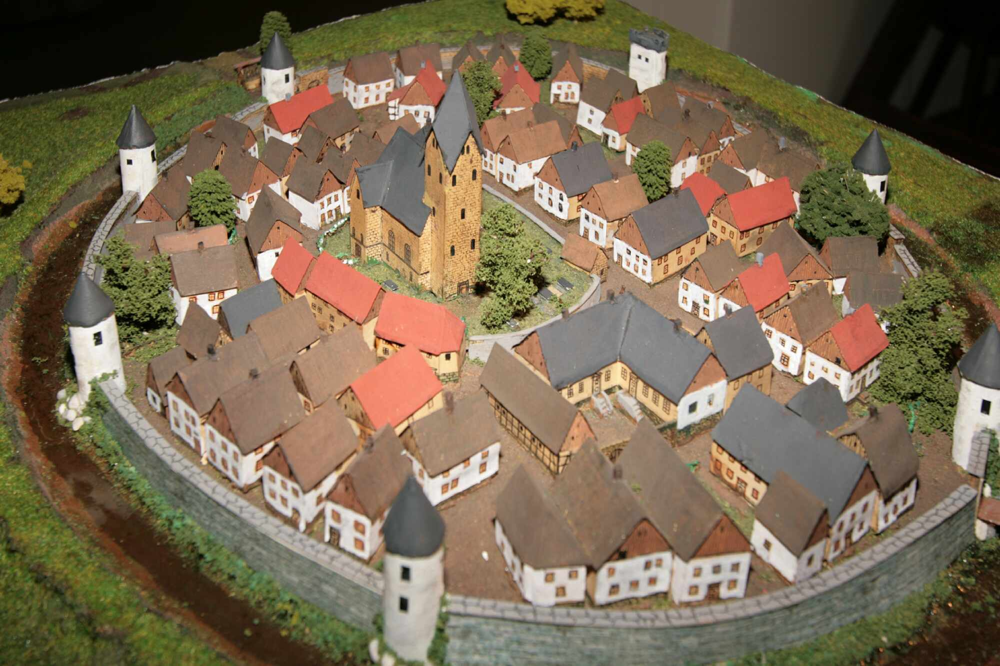 Lüdenscheid, Geschichtsmuseum, Modell der Stadt